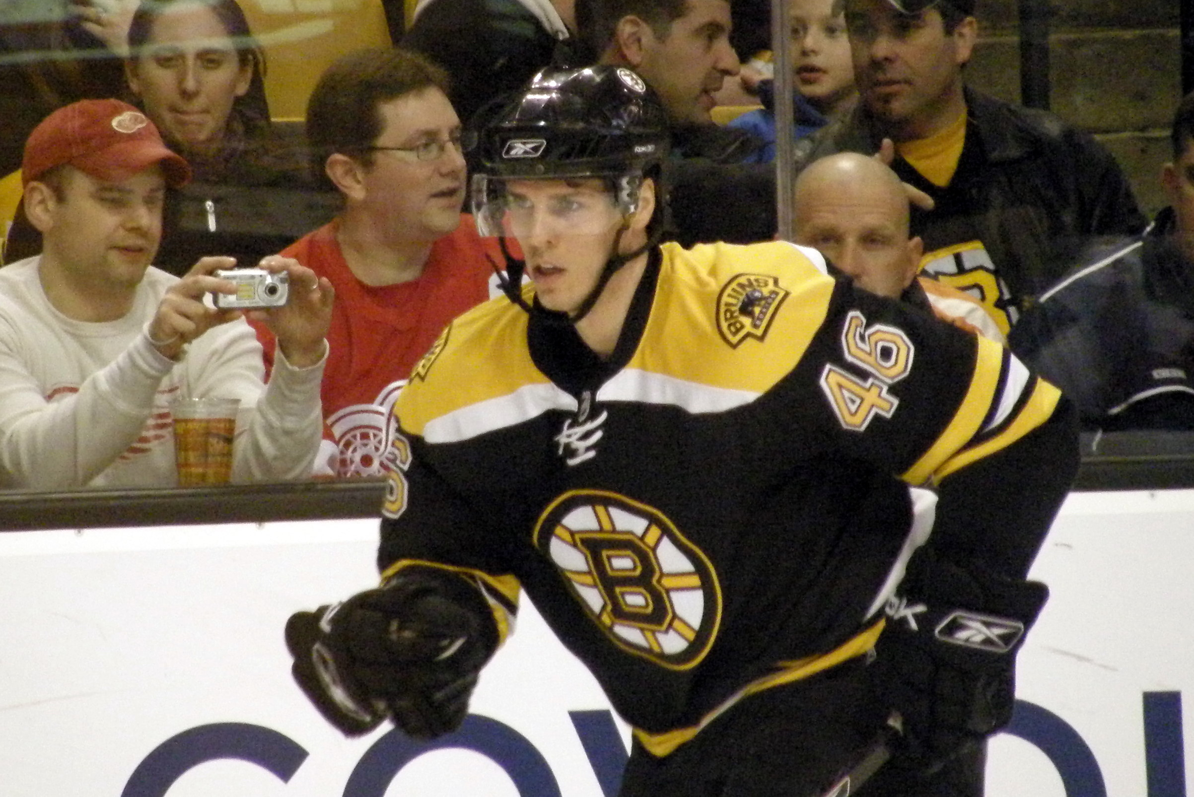 #46 David Krejci (C)